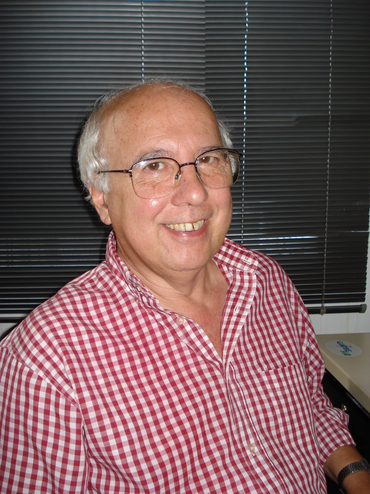 Marcos Machado en diciembre de 2007.